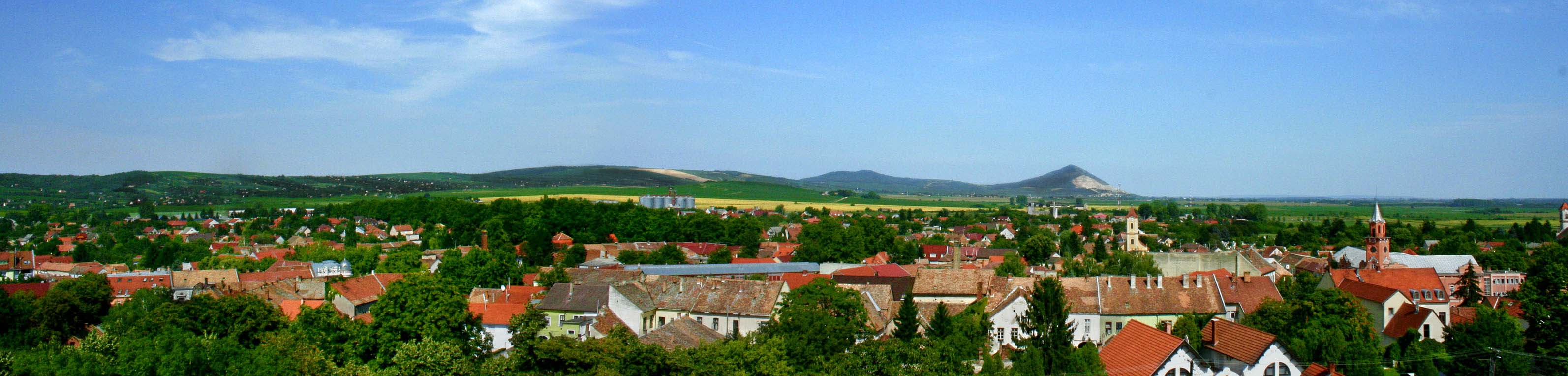 Siklós látképe a vár északi oldala felől